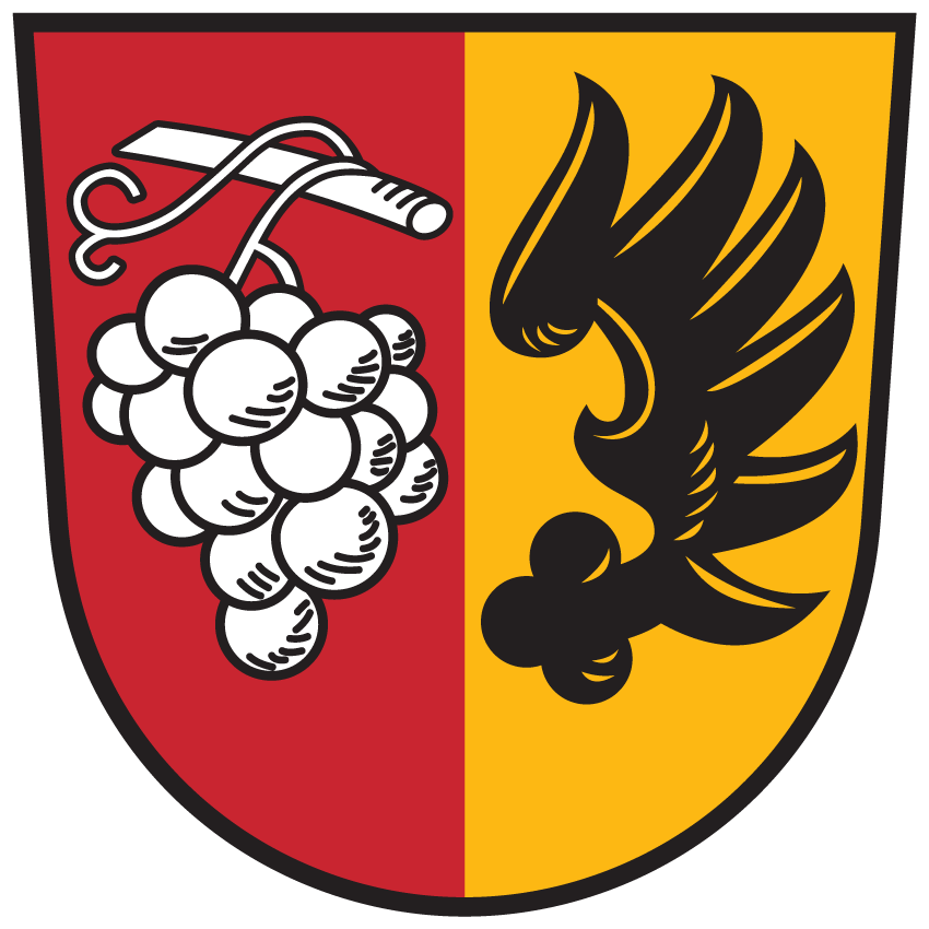 Wappen von Sittersorf